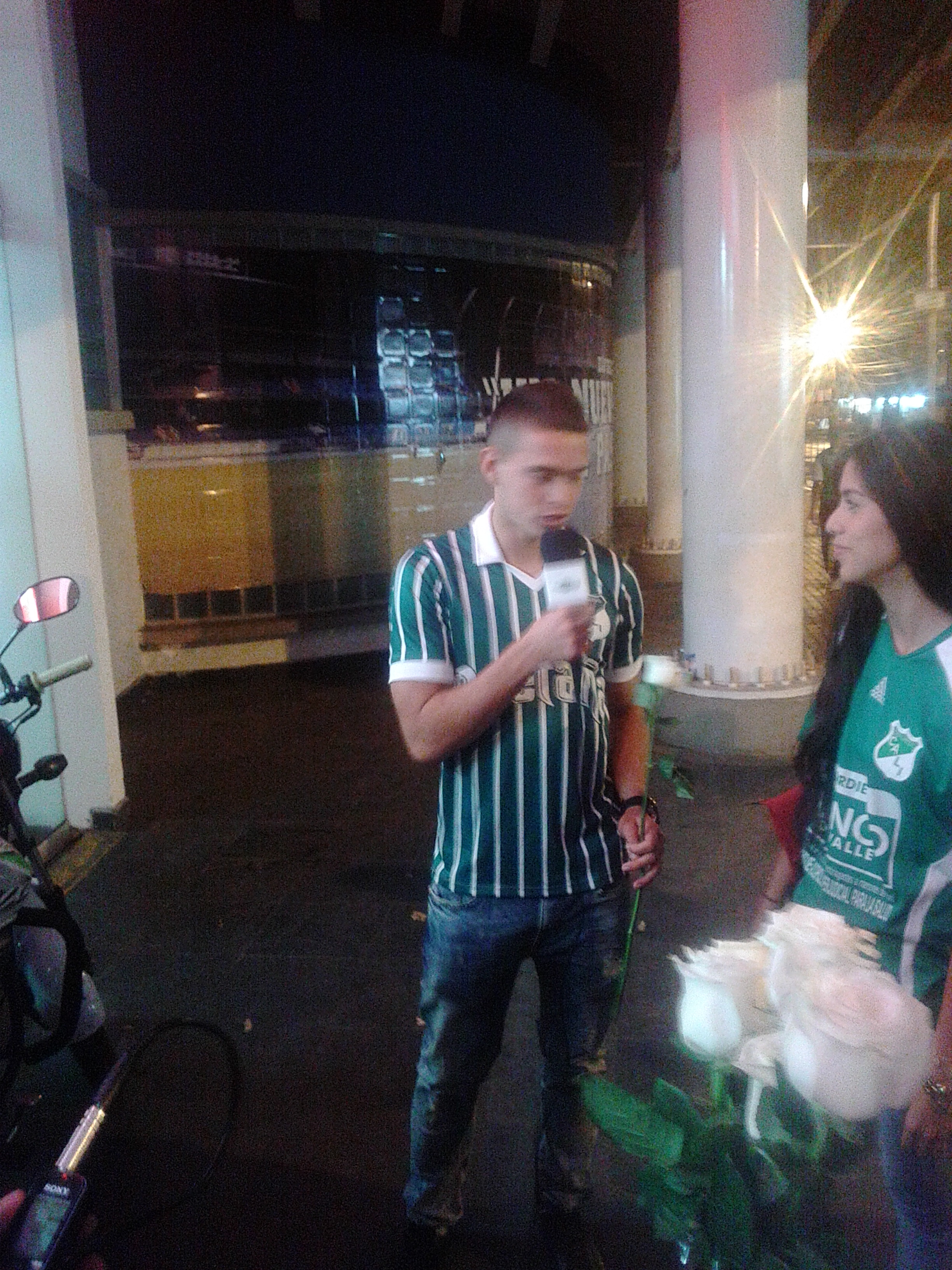 Partido Deportivo Cali vs Once Caldas Liga Águila 2016-I